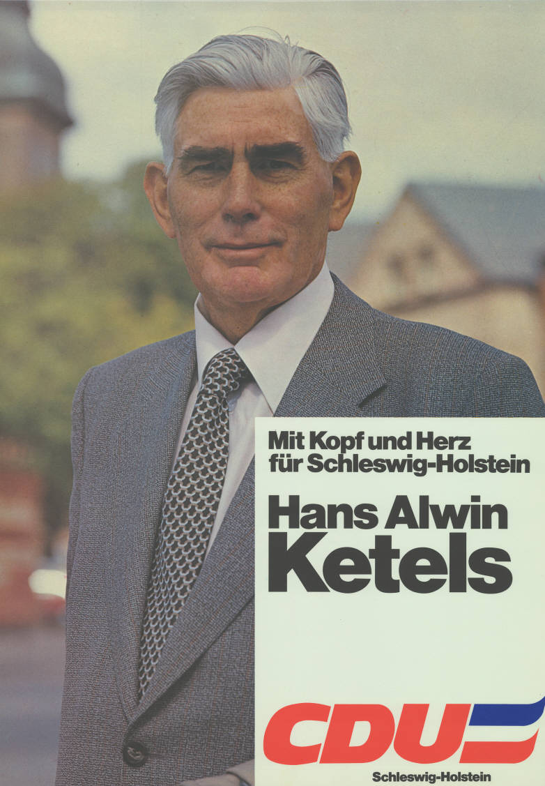 Mit Kopf und Herz für Schleswig-Holstein Hans Alwin Ketels CDU Schleswig-Holstein Abbildung: Foto Plakatart: Kandidaten-/Personenplakat mit Porträt Auftraggeber: Verantw.: CDU Schleswig-Holstein Objekt-Signatur: 10-012 : 434 Bestand: Landtagswahlplakate Schleswig-Holstein (10-012) GliederungBestand10-18: Landtagswahlplakate Schleswig-Holstein (10-012) » Landtagswahl am 29.4.1979 » Kandidatenplakate Lizenz: KAS/ACDP 10-012 : 434 CC-BY-SA 3.0 DE